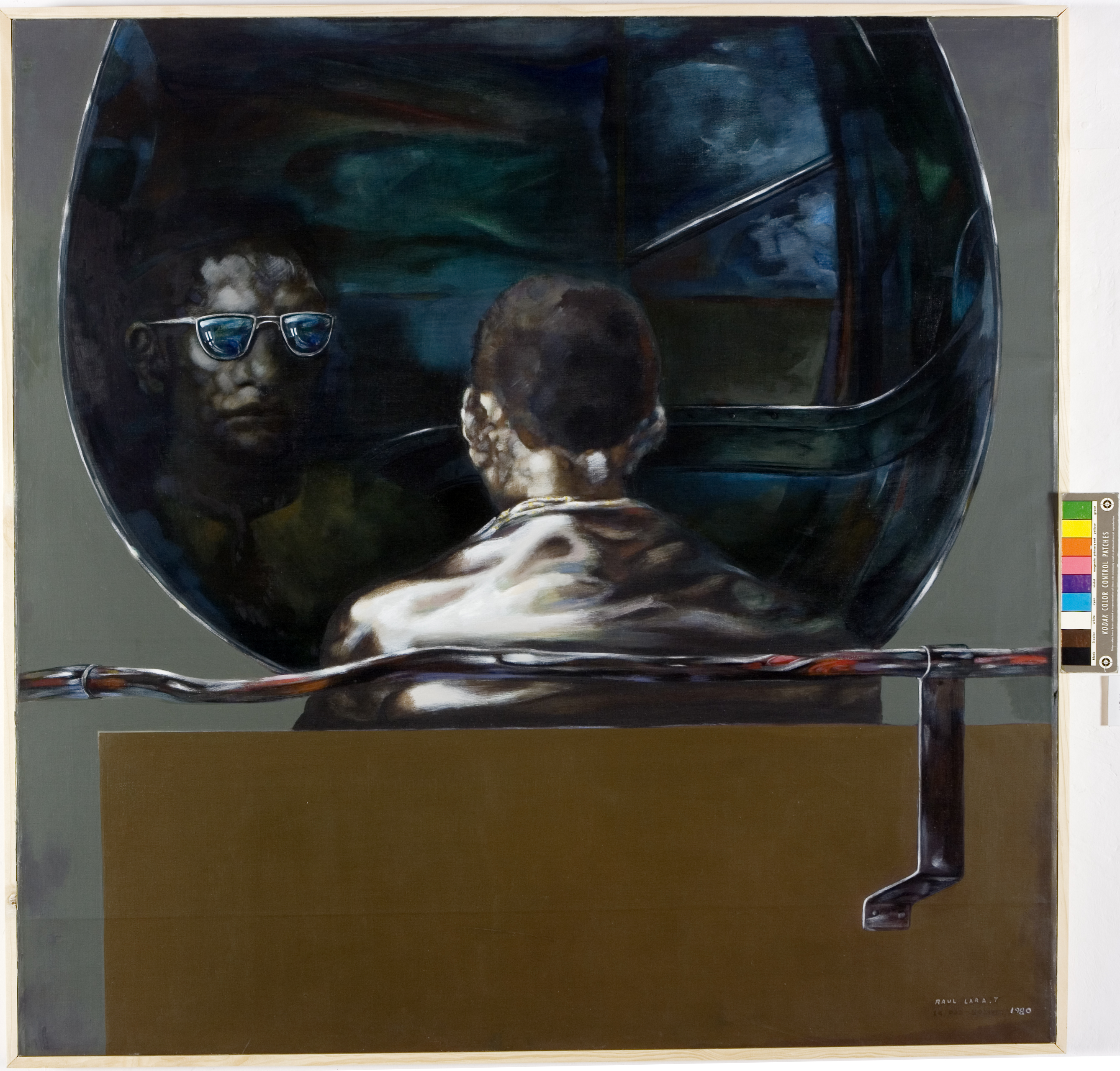 Una obra del maestro Raul Lara de la década del 80, inspirada en los cholos y los buses de transporte publico de aquel entonces.